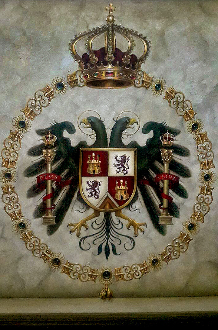 Segundo escudo de la Villa Imperial de Potosí, obra de Saulo Mariscal B.